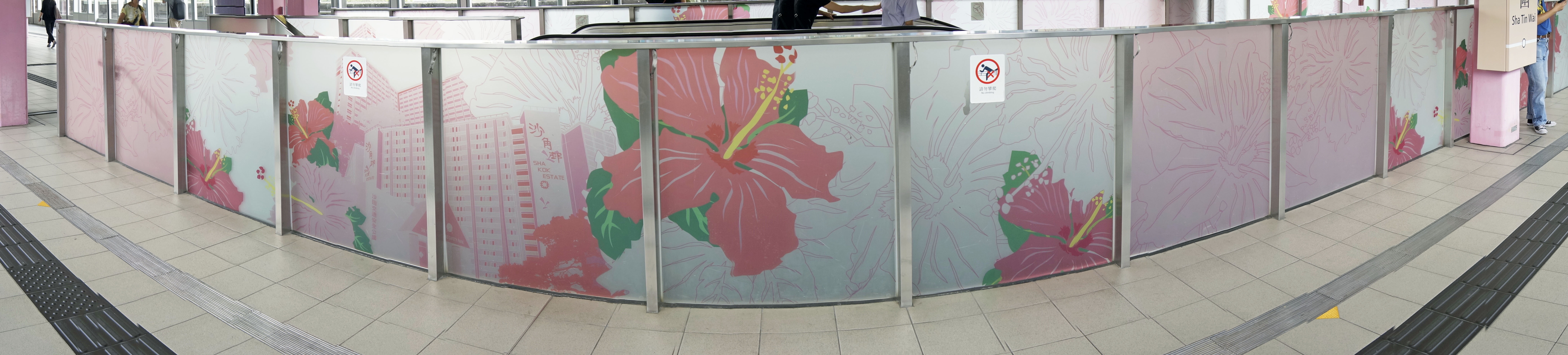 港鐵沙田圍站月台佈置全景圖